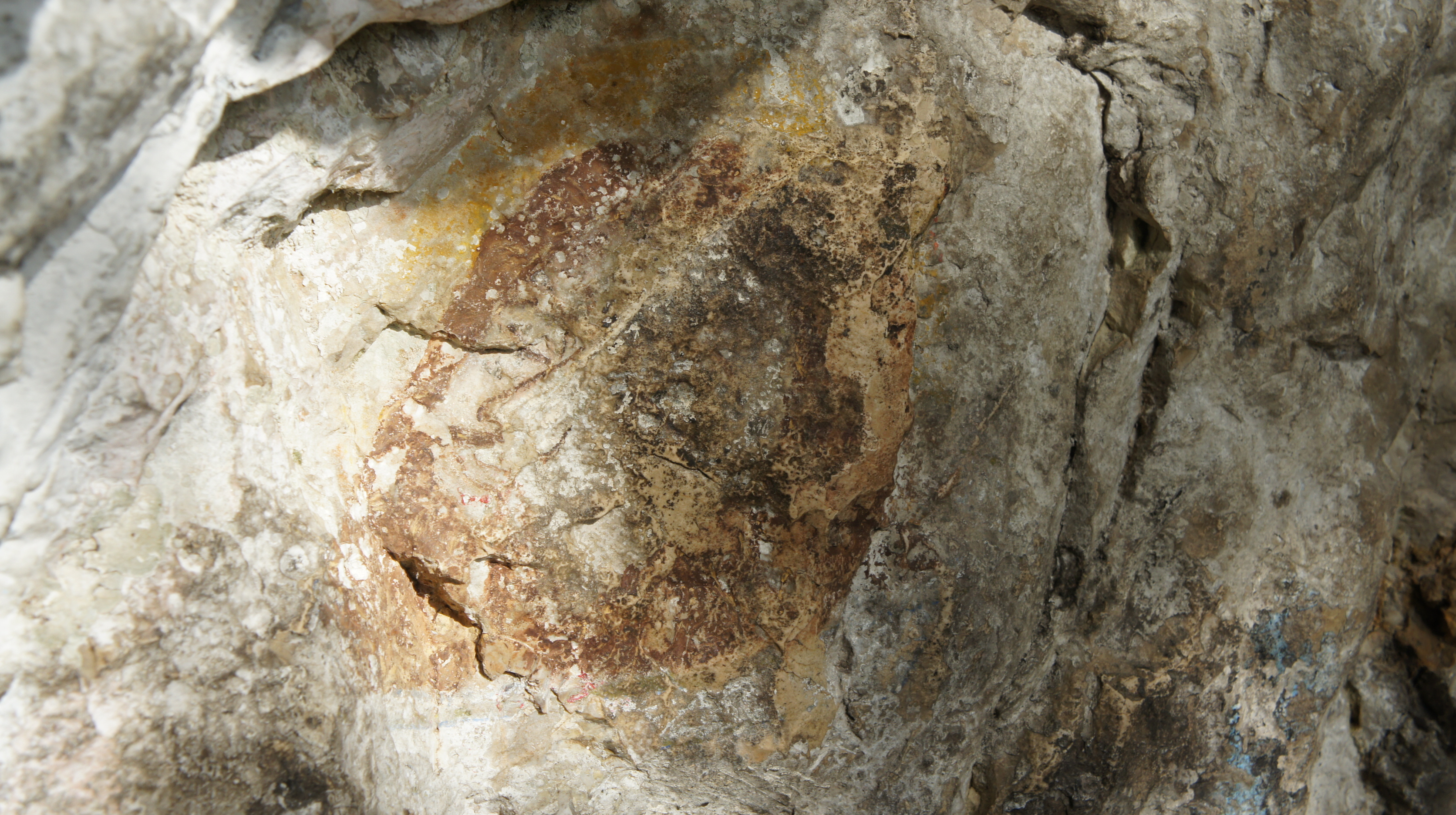 Нерукотворный образ Иоанна Предтечи на месте третьего обретения Главы святого в Команах Абхазских